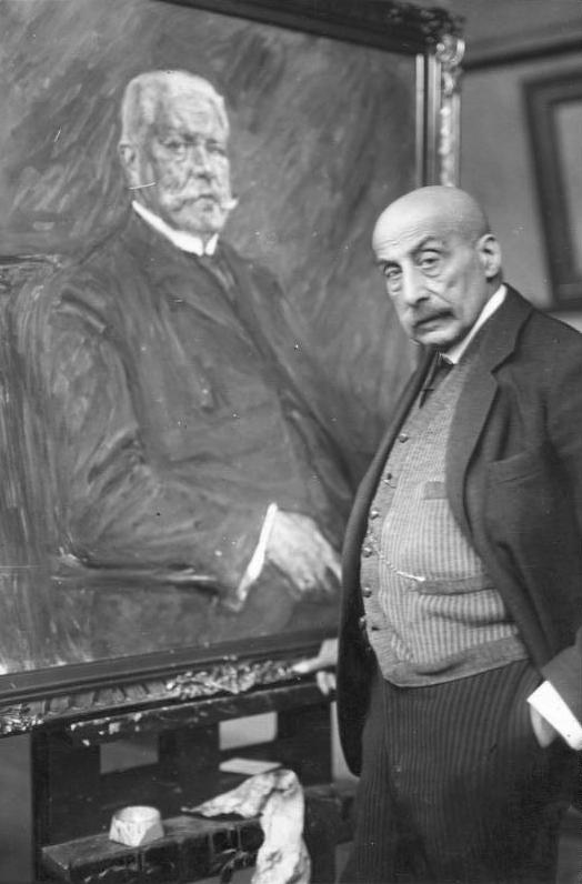 Max Liebermann vor Porträt "Paul von Hindenburg" ADN-ZB/Archiv Der Maler Prof. Max Liebermann mit einem Porträt des Reichspräsidenten [Paul von] Hindenburg in seinem Atelier. Abgebildete Personen: Liebermann, Max Prof.: Maler, Graphiker, Deutschland Hindenburg, Paul von Beneckendorff und von: Reichspräsident, Generalfeldmarschall, Deutschland (GND 118551264)